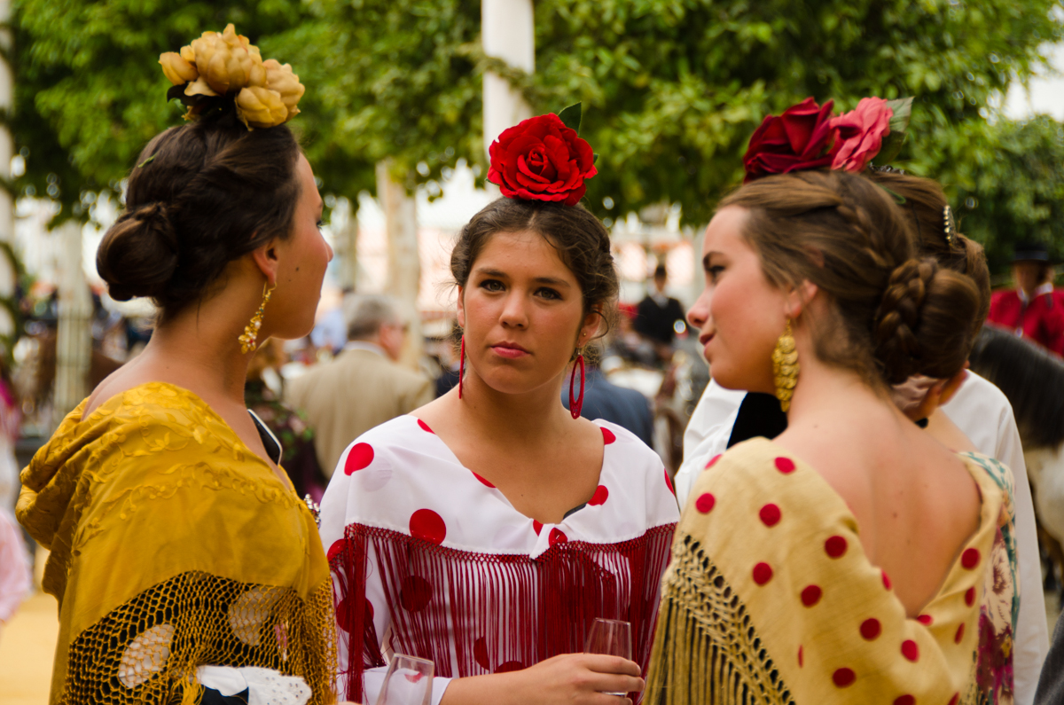 Feria de abril de Sevilla 2012